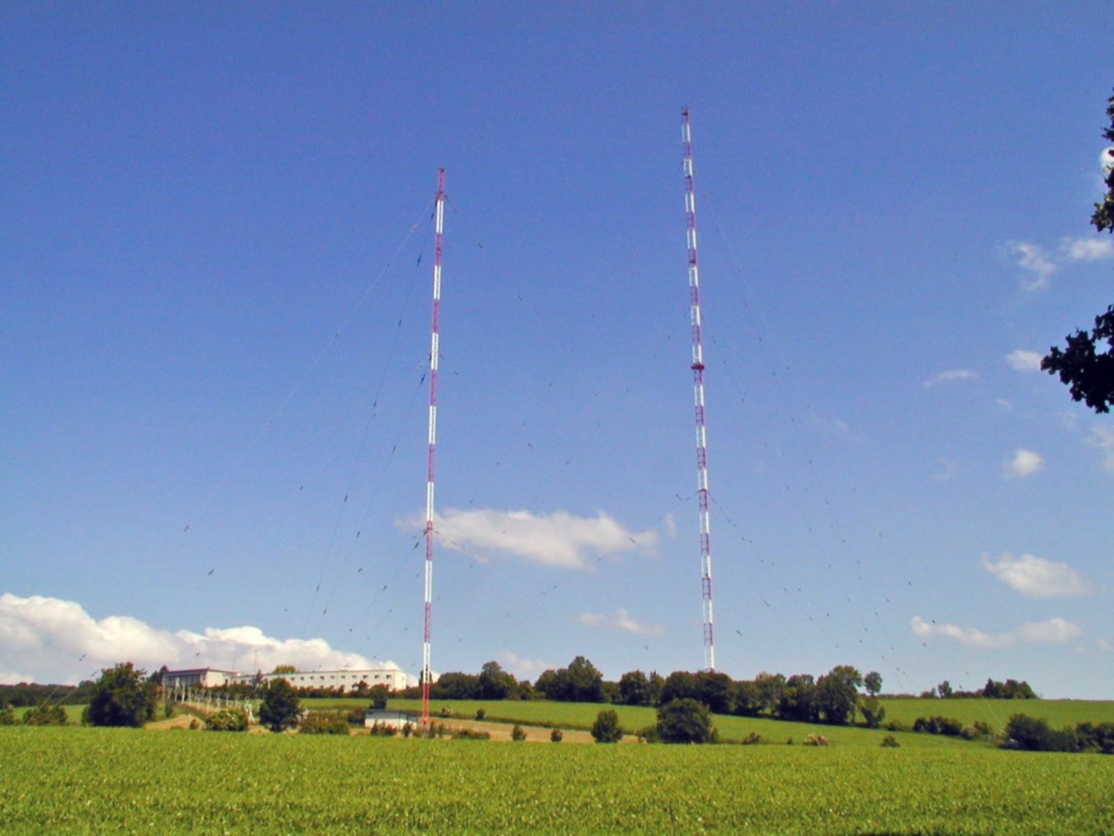 Sendeanlage Bisamberg bei Wien. Von links nach rechts: Sendegebäude, Südmast (120m), Nordmast (265m).